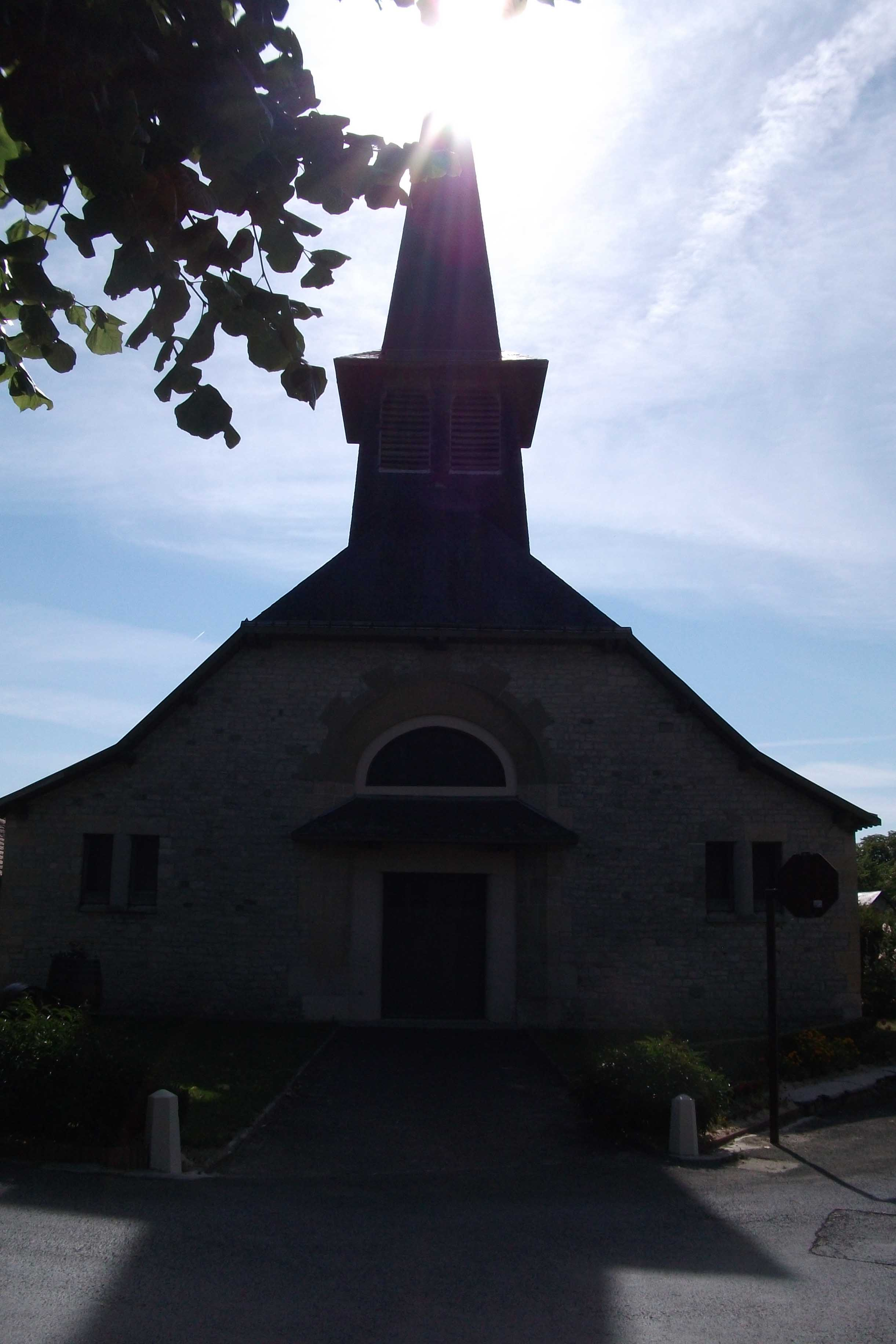 Église de Merfy vue depuis la place du souvenir.